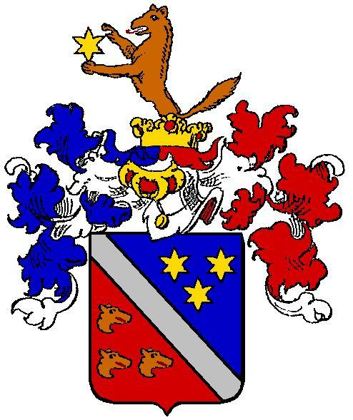 Rodový znak